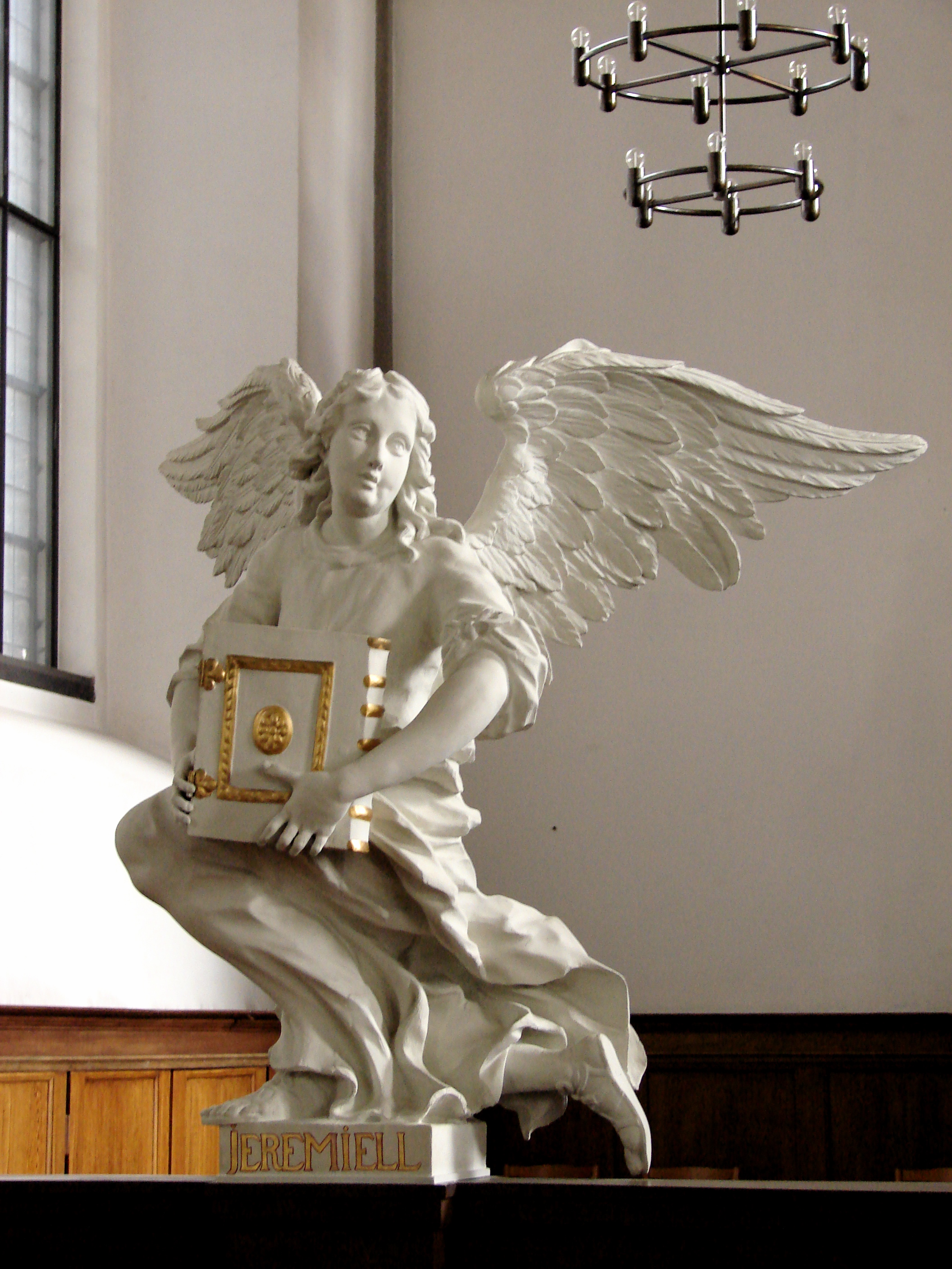 Alterskuptur fra Vor Frelsers Kirke, Christianshavn ved København